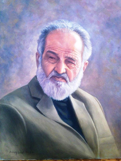 نقاشی از حیدری وجودری